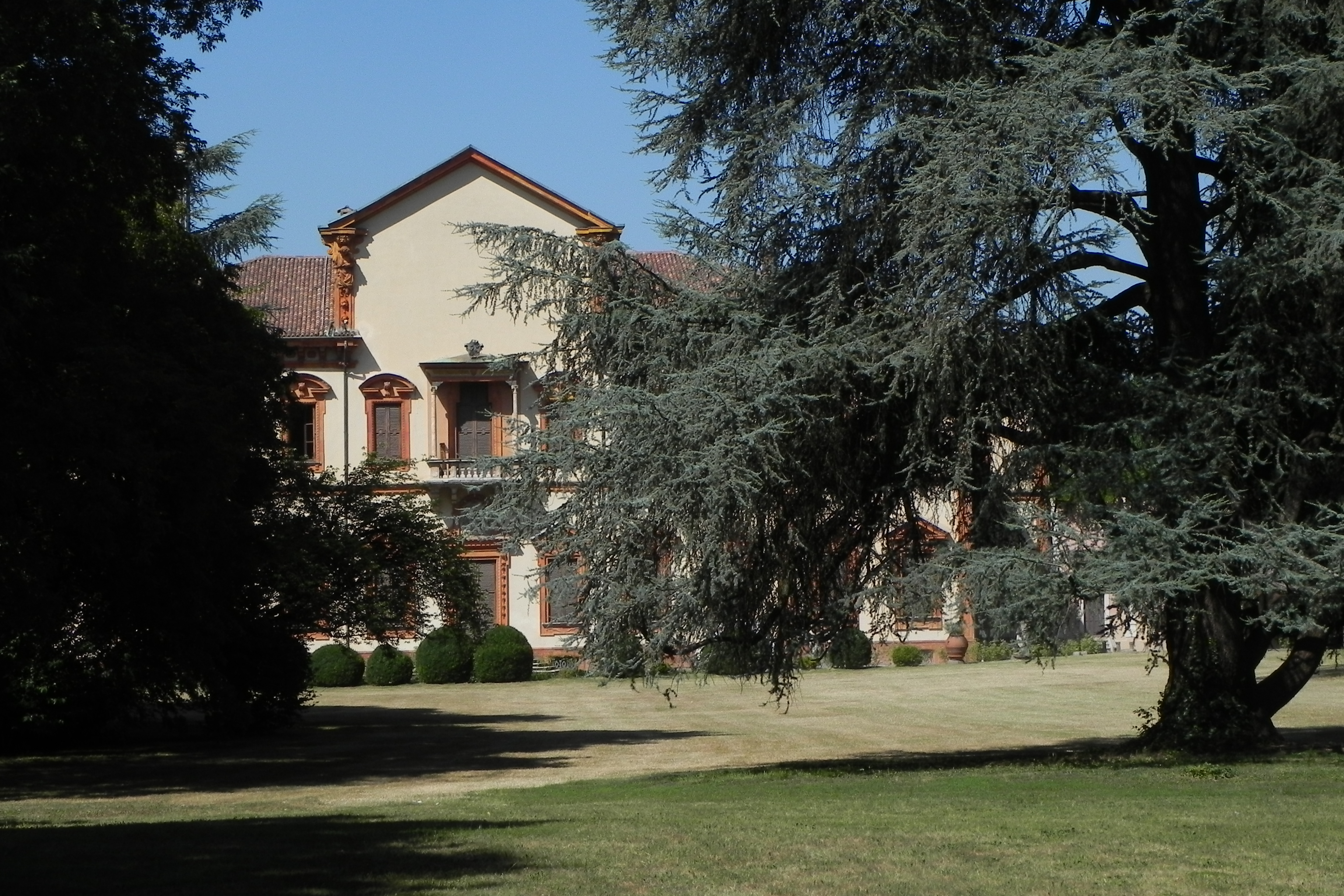 Cinisello Balsamo, Villa Ghirlanda Silva, retro